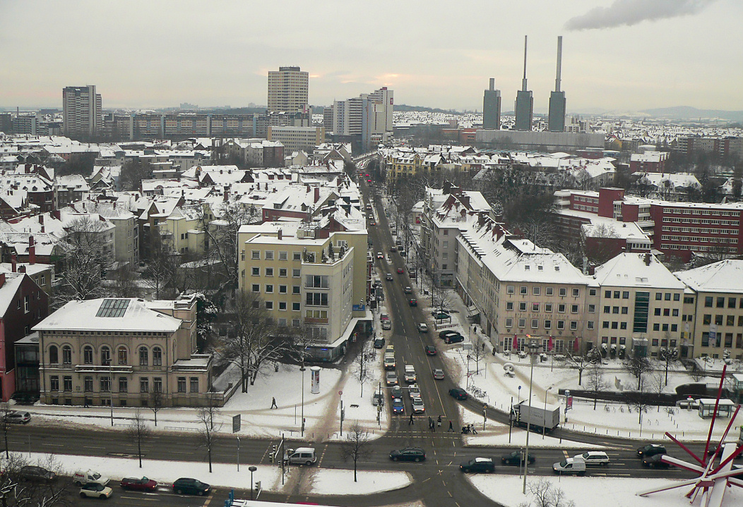 Blick vom Königsworther Platz nach Linden im Winter